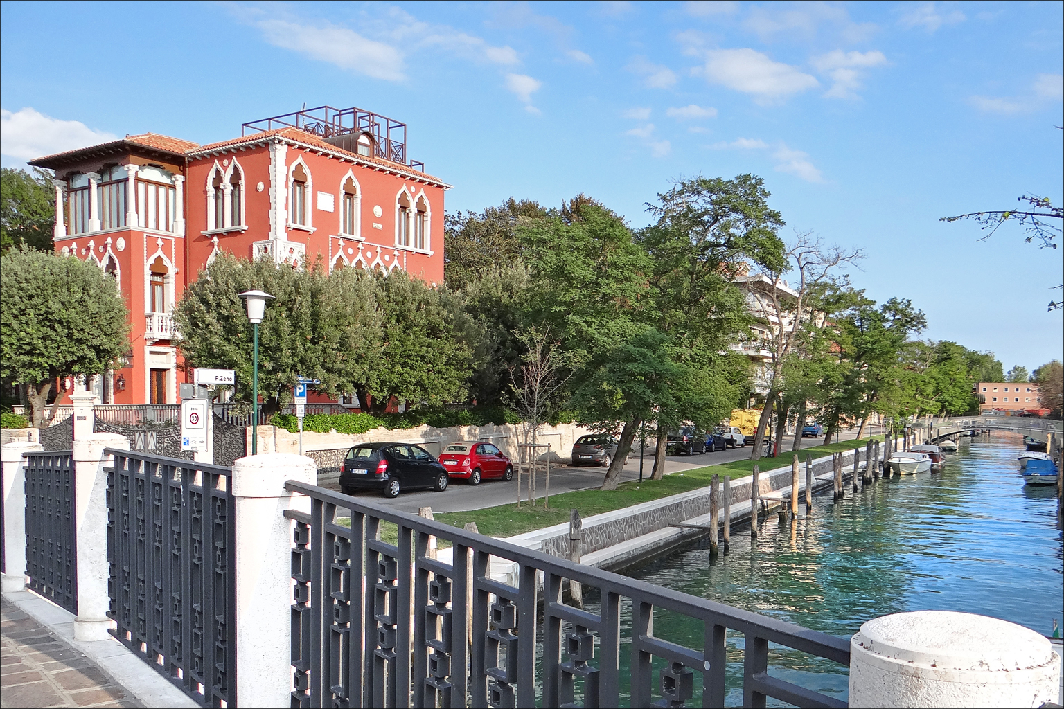 La villa Bianca ou villa Quarti, sur la via Pietro Zeno au bord du canal La villa a été conçue par l'architecte Rubens Corrado vers 1909 pour Luigi Quarti Elle est dans le style gothique de la fin du XVème siècle La villa est orientée vers la lagune ___________ Le Lido de Venise est une bande étroite de terre sablonneuse de 12 Km de long qui sépare la lagune de Venise de la mer Adriatique. Au 19ème siècle, le Lido commence à être fréquenté pour les bains de mer en raison de la beauté de ses plages. Le Grand Hôtel des Bains est ouvert en 1900 (il est actuellement en rénovation) et accueille des clients illustres (écrivains, aristocrates, artistes,..) comme le Grand Hôtel Excelsior, construit dans le style néo-mauresque, ouvert à proximité quelques années plus tard, en 1908. A la demande de Mussolini, le Palais du cinéma ne sera construit dans le style art déco qu'en 1937 à coté de l'Excelsior pour que le festival (Mostra) puisse s'y dérouler dans de bonnes conditions. Concentrées autour de ces palaces, de luxueuses maisons sont édifiées à partir du début du siècle dernier, dans des styles influencés par l'art nouveau (appelé style Liberty en Italie), ou un peu plus tard par l'art déco, mais aussi par l'art byzantin, l'art médiéval, l'art de la Renaissance italienne, l'art oriental ou même par l'art du nord de l'Europe. En raison de la proximité de Venise, les formes et décors vénitiens constituent d'importantes sources d'inspiration des architectes. Il en résulte un ensemble de maisons et d'immeubles dans le style éclectique, avec des éléments de style Liberty, qui ne se rencontre que dans cette région de l'Italie. Article de Wikipedia sur le Lido de Venise